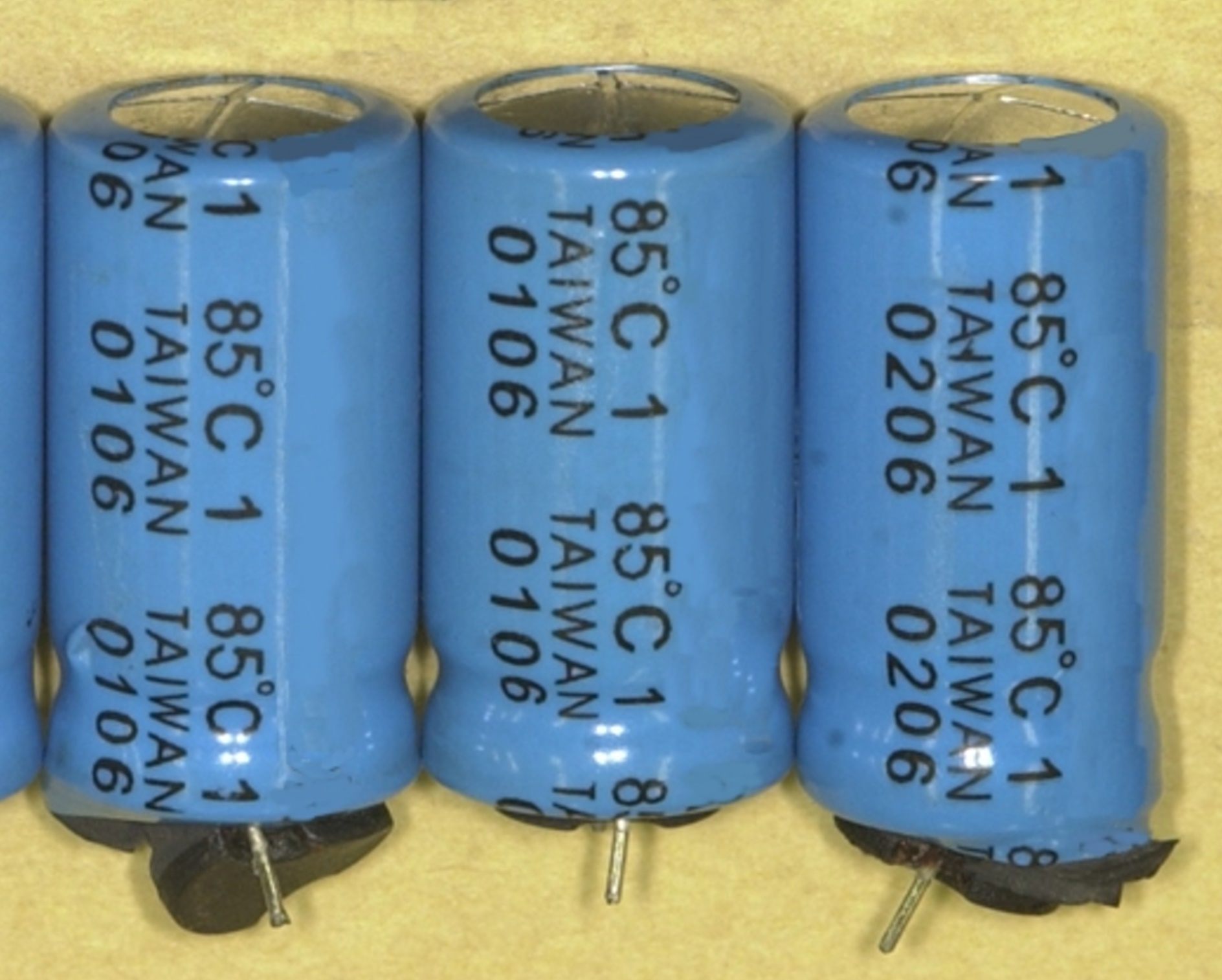 Elkos mit ausgedrücktem Gummistopfen und aufgeblähten Becher, Herstelldatum „0206“ (Feb 2006)